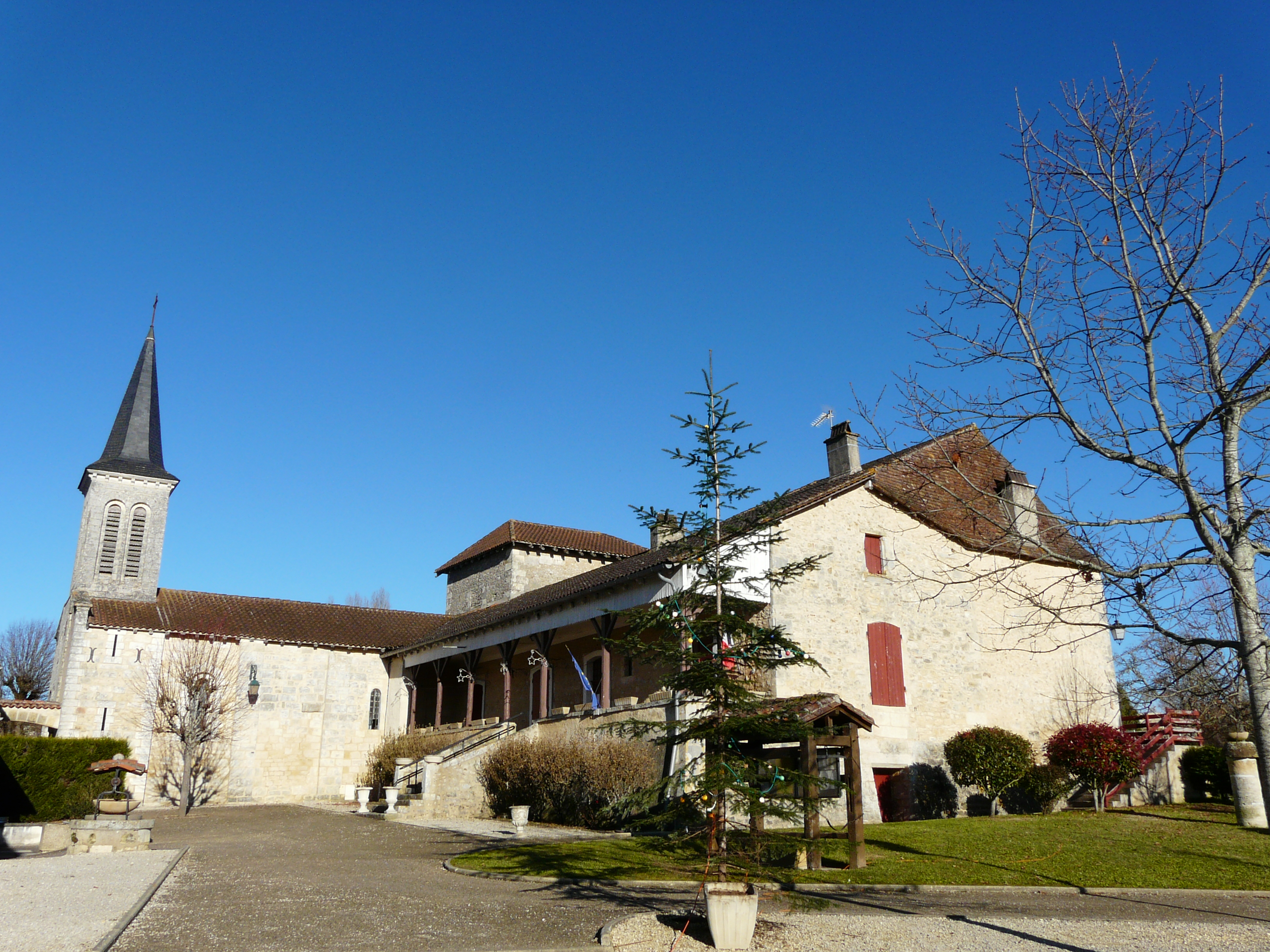 L'église et la mairie (ancien presbytère) de Blis-et-Born, Dordogne, France.